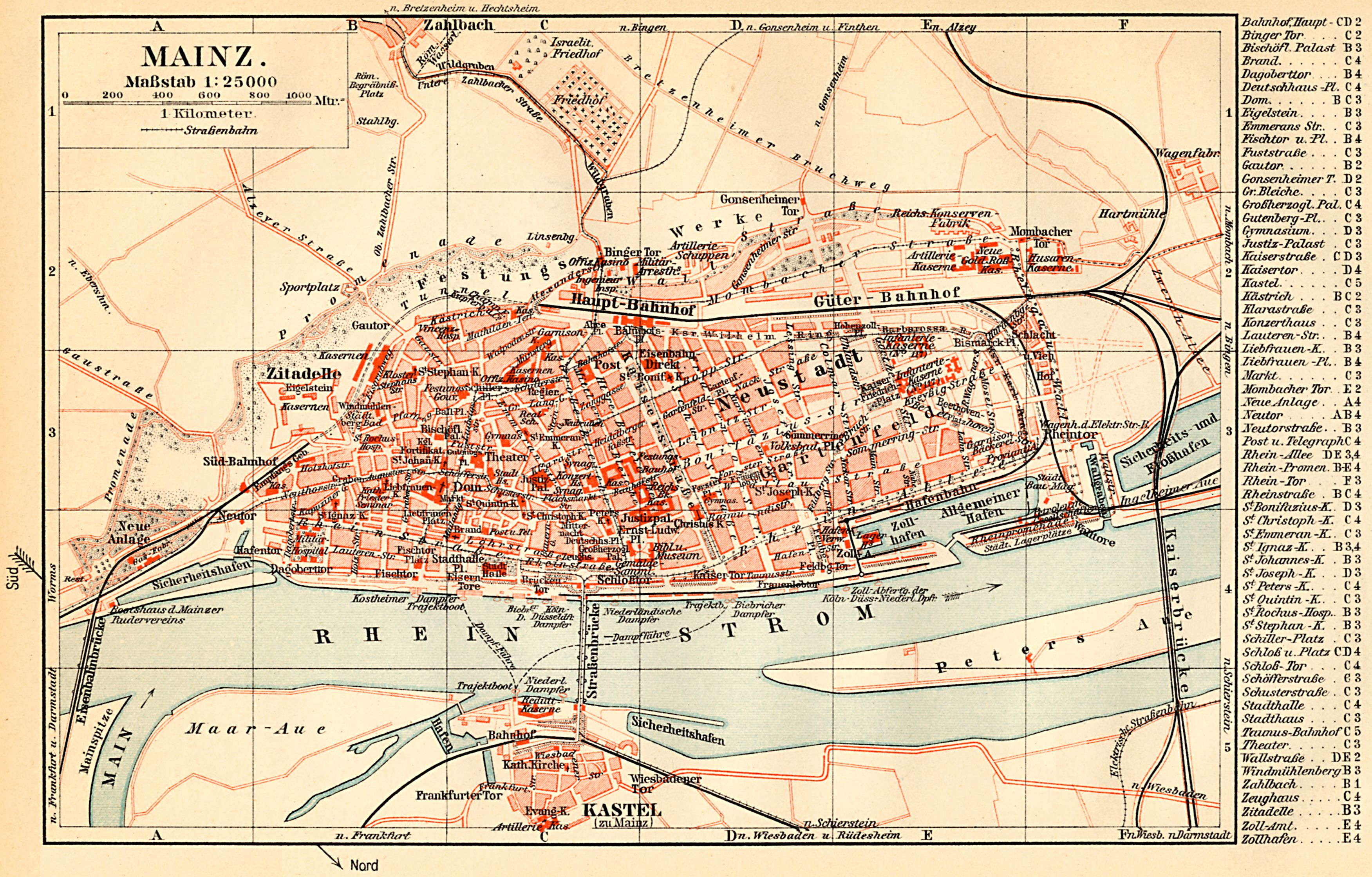 Mainz Stadtplan mit Kastel-Stadtplan